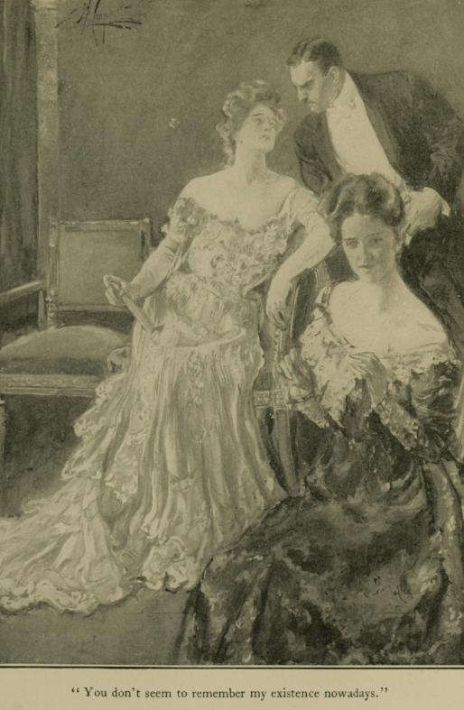 Illustration